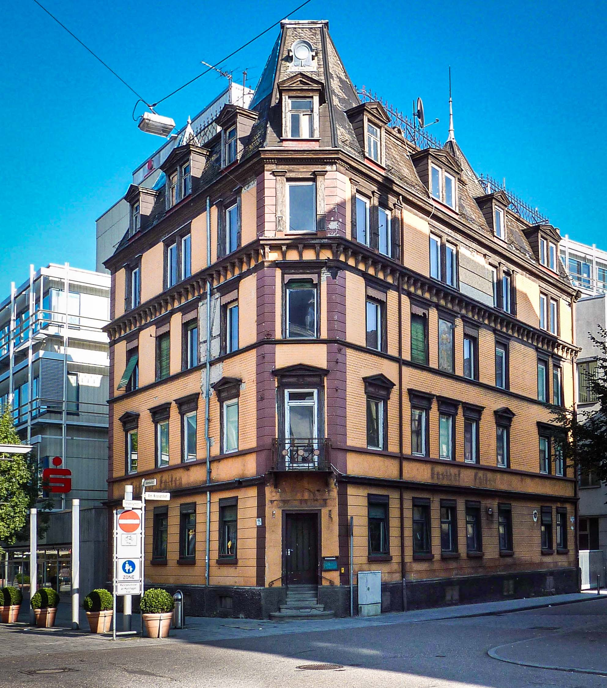 ehemaliges Gasthaus zum Falken